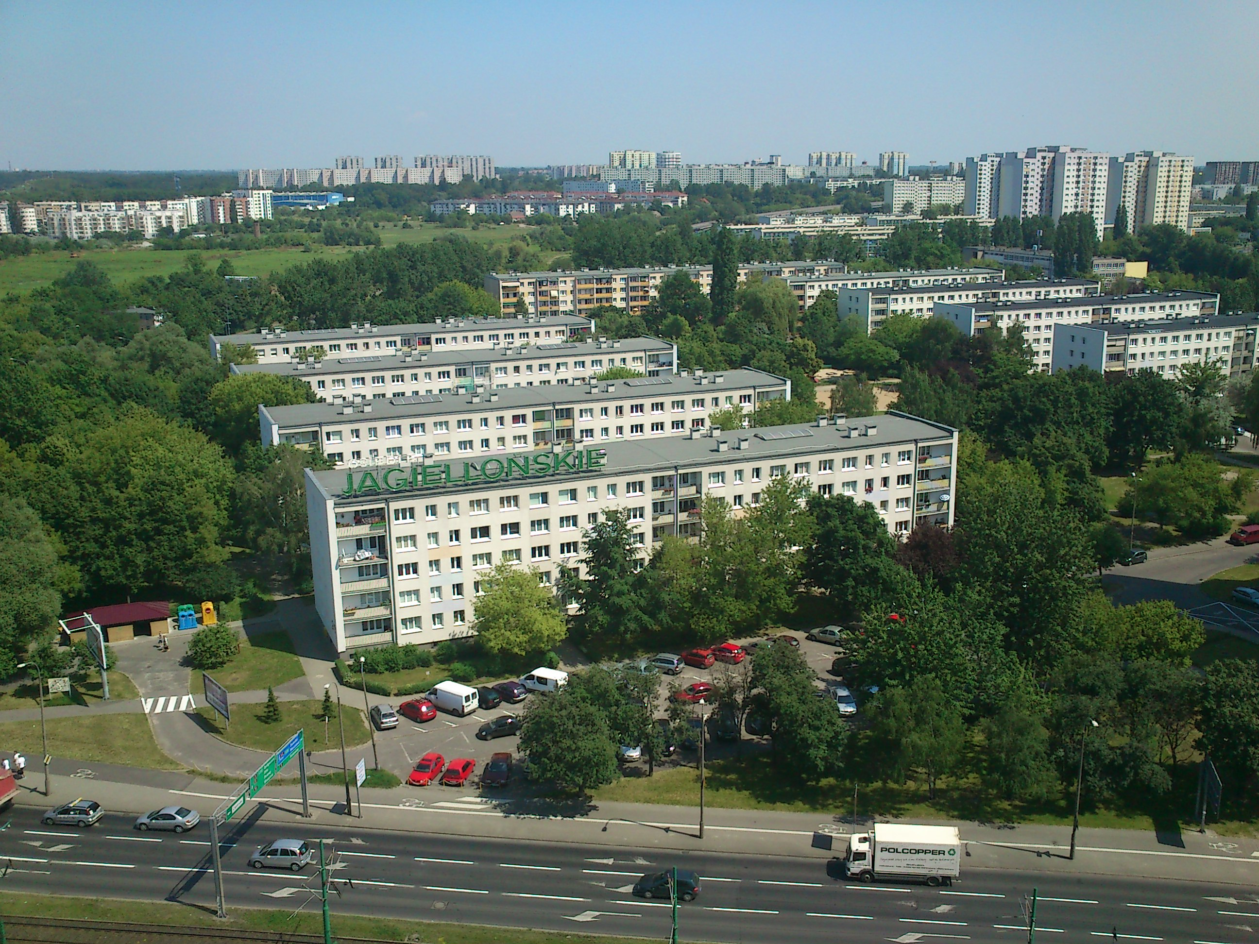 Osiedle Jagiellońskie w Poznaniu od strony osiedla Piastowskiego